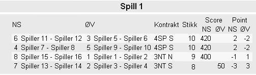 Bridgeslipp fra parturnering